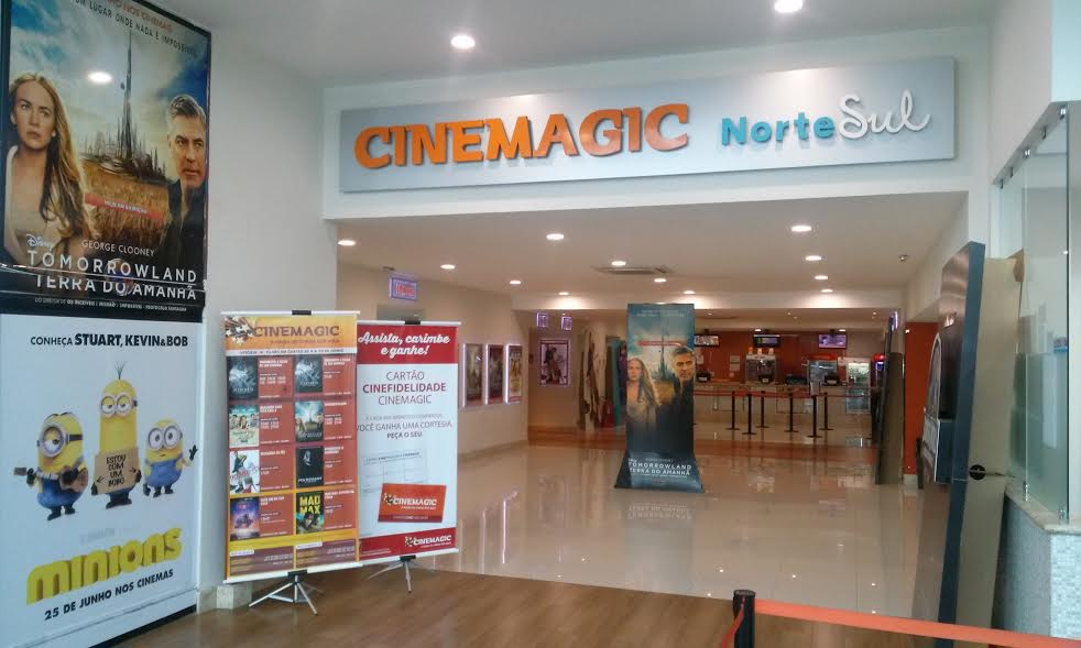 Fachada do Cinemagic Norte Sul de Vitória